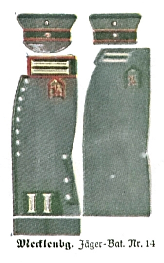 Uniform des Großherzoglich Mecklenburgisches Jäger-Bataillon Nr. 14 von 1916.